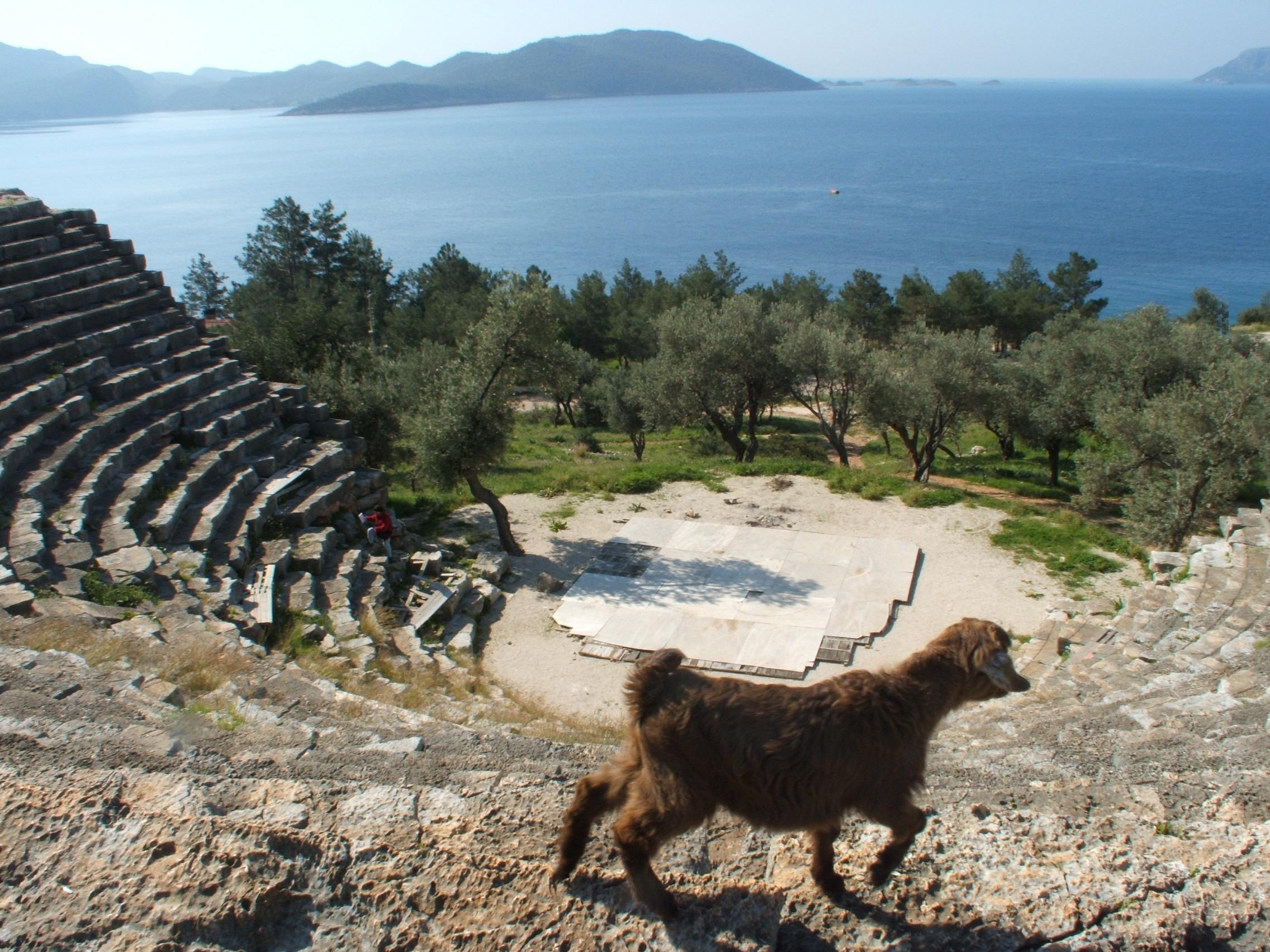 Antiphellos 2